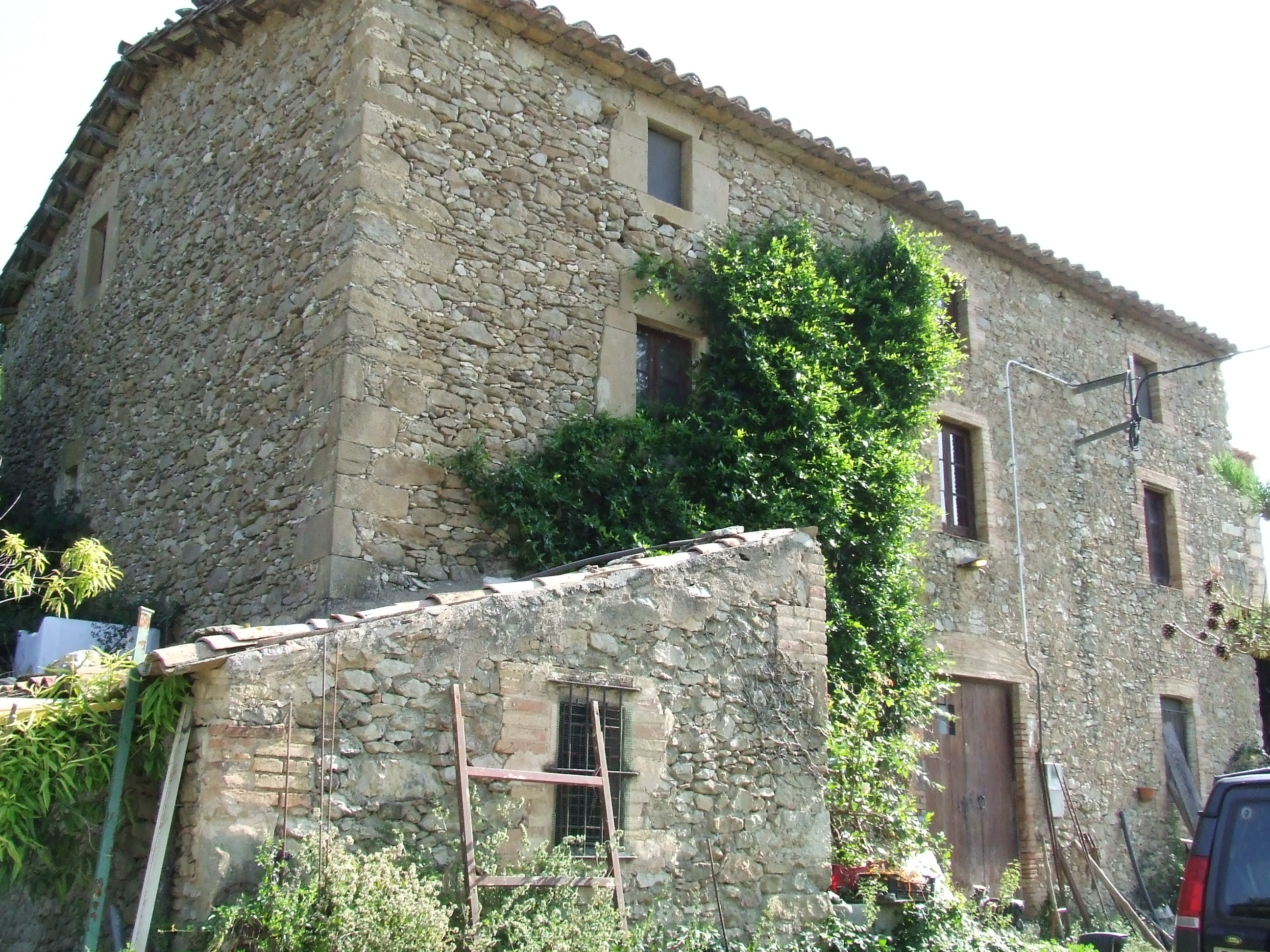 El Bonifet (Santa Coloma Sasserra, Castellcir, Moianès)